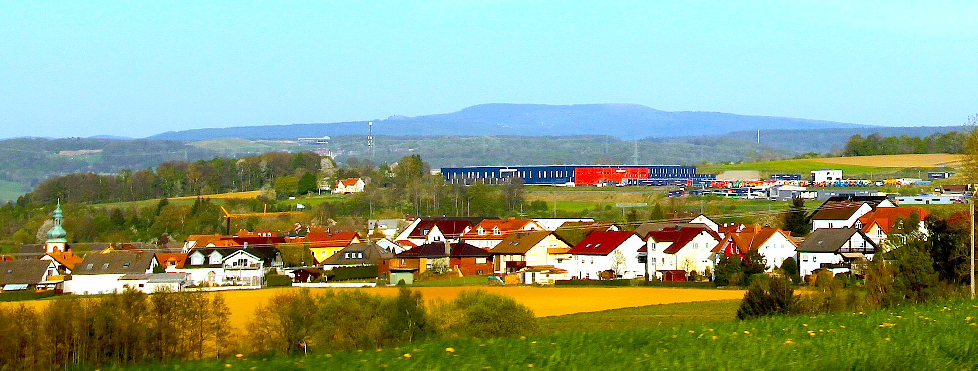 Der Ort Flieden mit dem Gewerbegebiet "Flieden Mitte". Die Hohe Rhön im Hintergrund.